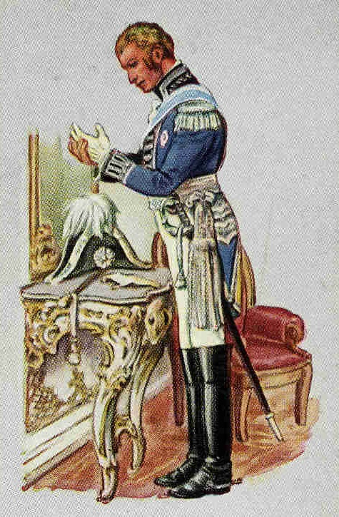 Capitaine du Hartschier, bavière